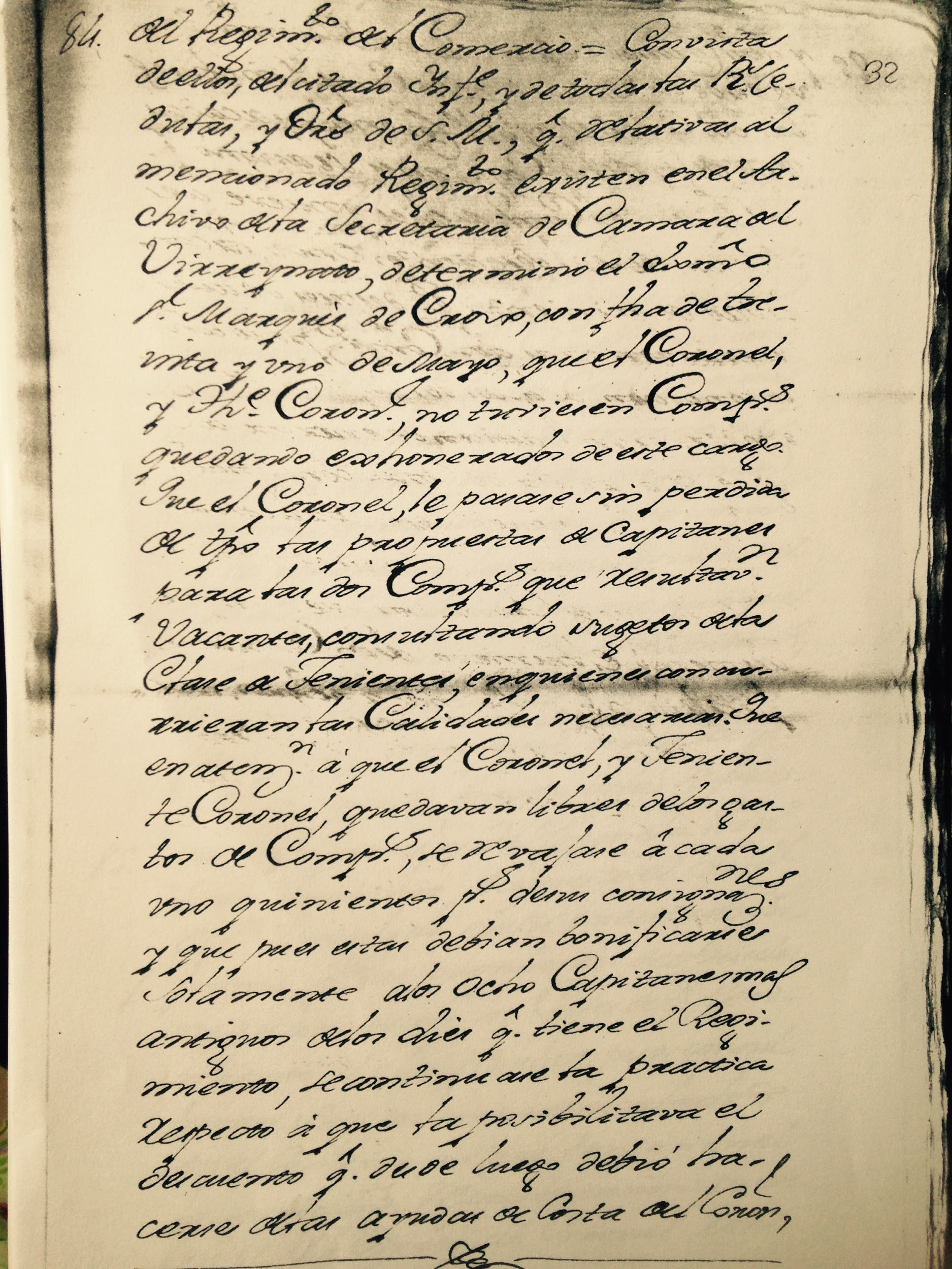 Documento sobre cambios dentro del Regimiento Urbano del Comercio en el año de 1784. Petición de Francisco Antonio Crespo.